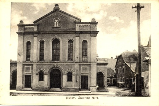 Ansichtskarte mit der Synagoge in Kyjov